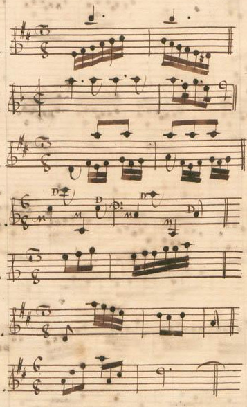 Table du volume XI des manuscrits de Parme (incipit des sonates 8 à 14, K. 395-401).